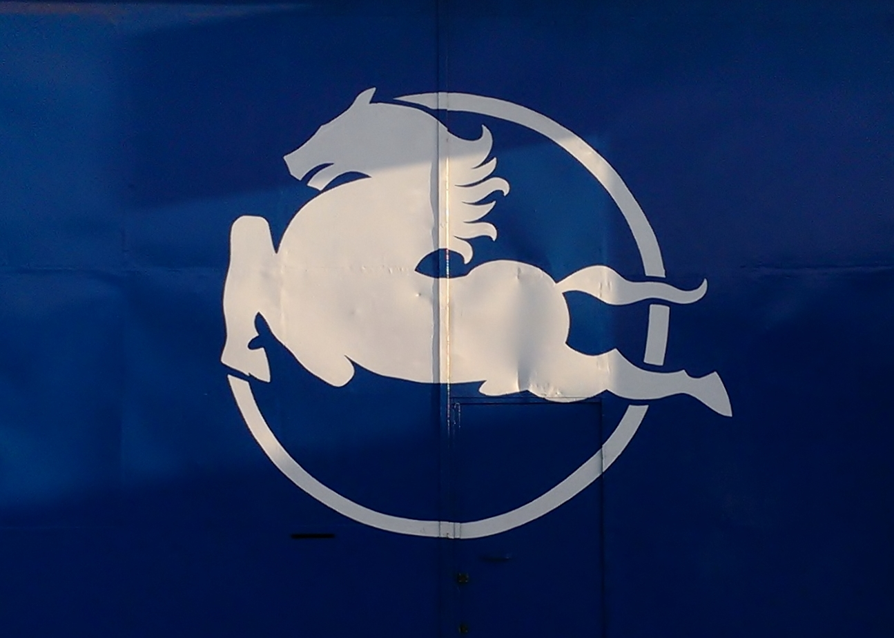 ENASA-Pegaso logotype